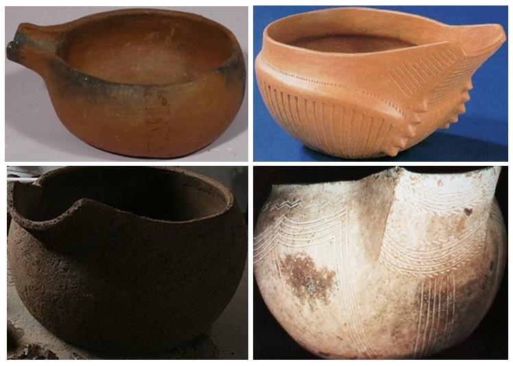 El tofio o tabajoste es un recipiente ligado a la cultura majorera de Fuerteventura (Canarias), isla en la que se utiliza para recoger la leche durante el ordeño de las cabras. Puede presentarse liso, bruñido o con engobe rojo, y decorado con esgrafiados o incisiones geométricas de origen precolombino.